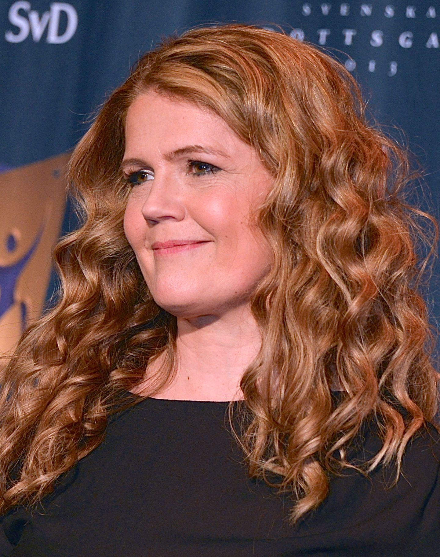 Marie Lehmann på Idrottsgalan på Globen i Stockholm den 14 januari 2013.